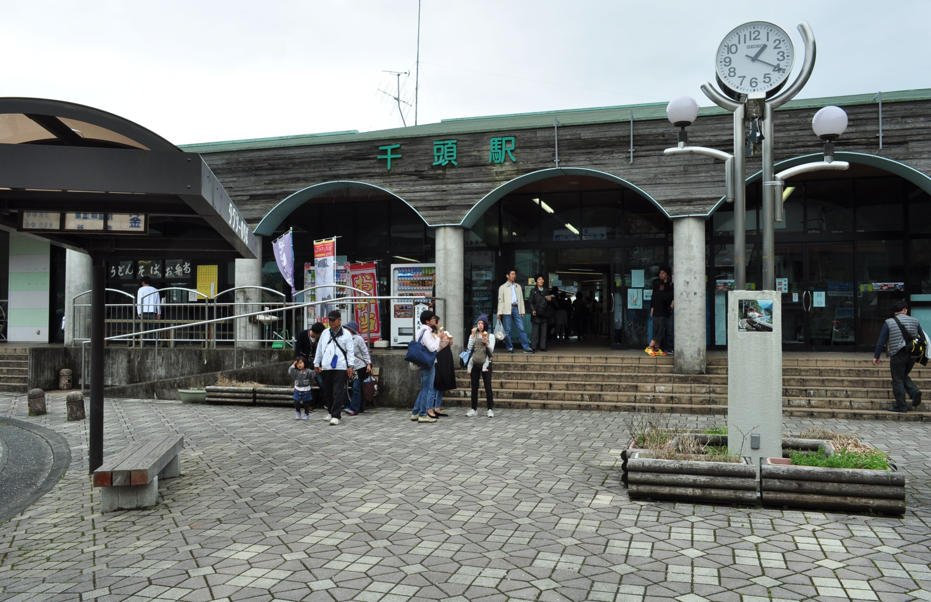 （2015年4月4日撮影）